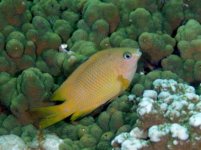 セダカスズメダイ Stegastes altus